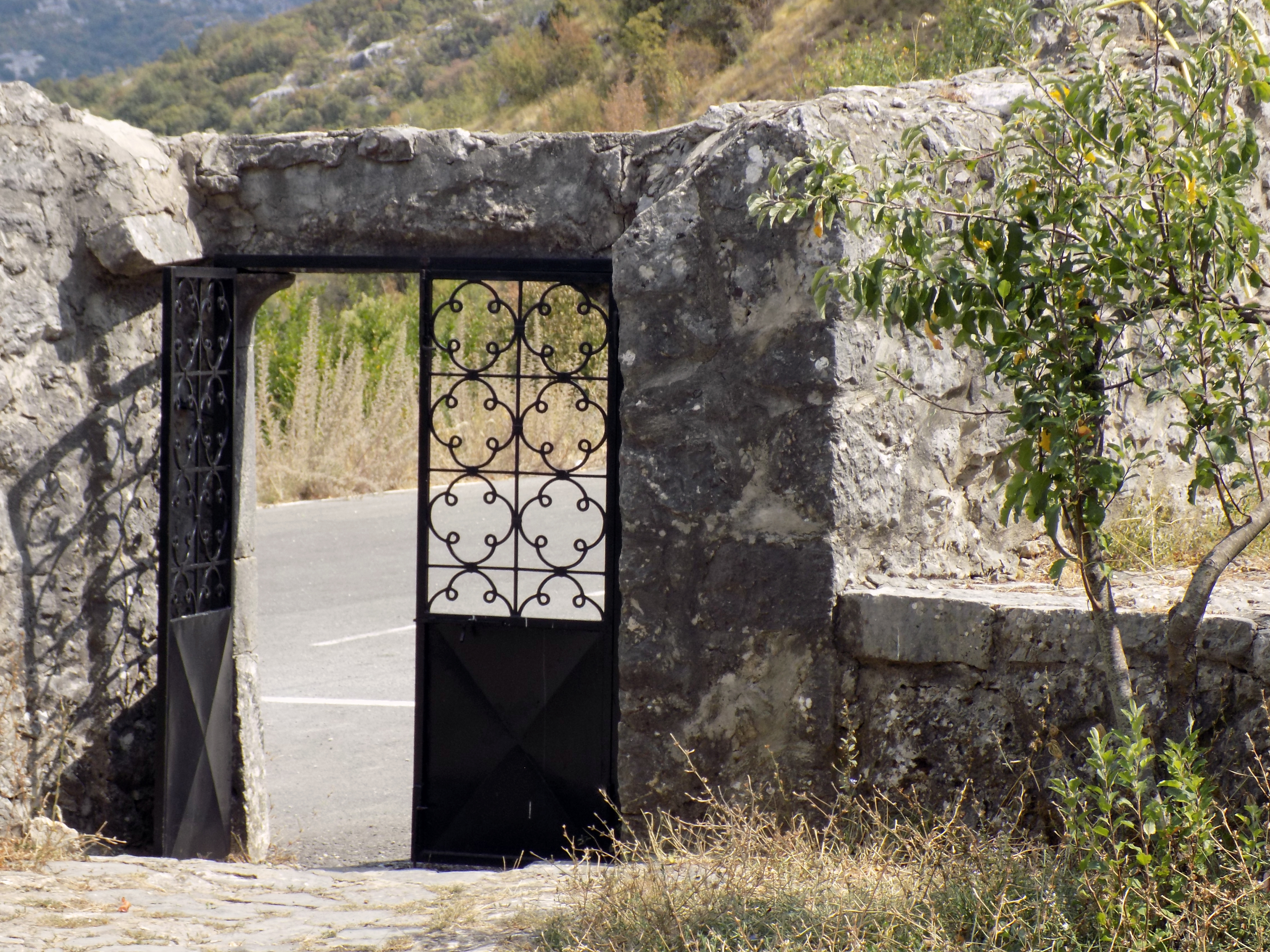 Kapija na ulazu u Muzej Marka Miljanova u Medunu, Crna gora